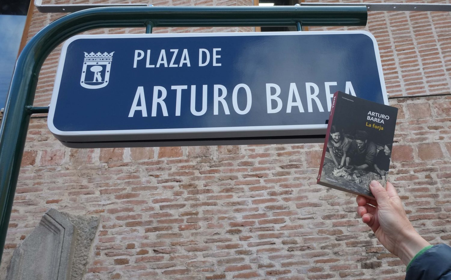 Vecino de Lavapiés y exiliado tras la Guerra Civil en Inglaterra donde falleció, Arturo Barea, el inolvidable escritor de la trilogía La forja de un rebelde, vuelve a su barrio, a ese “Avapiés” como él lo denominaba en su obra. Esta mañana la alcaldesa de Madrid, Manuela Carmena, acompañada por el embajador de Reino Unido en España, Simon John Manley, y el concejal de Centro, Jorge García Castaño, ha descubierto la placa con el nombre del escritor que, desde hoy sábado, da nombre a la plaza, antes conocida popularmente como plaza de Agustín Lara y situada en la confluencia de las calles del Sombrerete y Mesón de Paredes, frente a las Escuelas Pías en las que estudió el escritor.